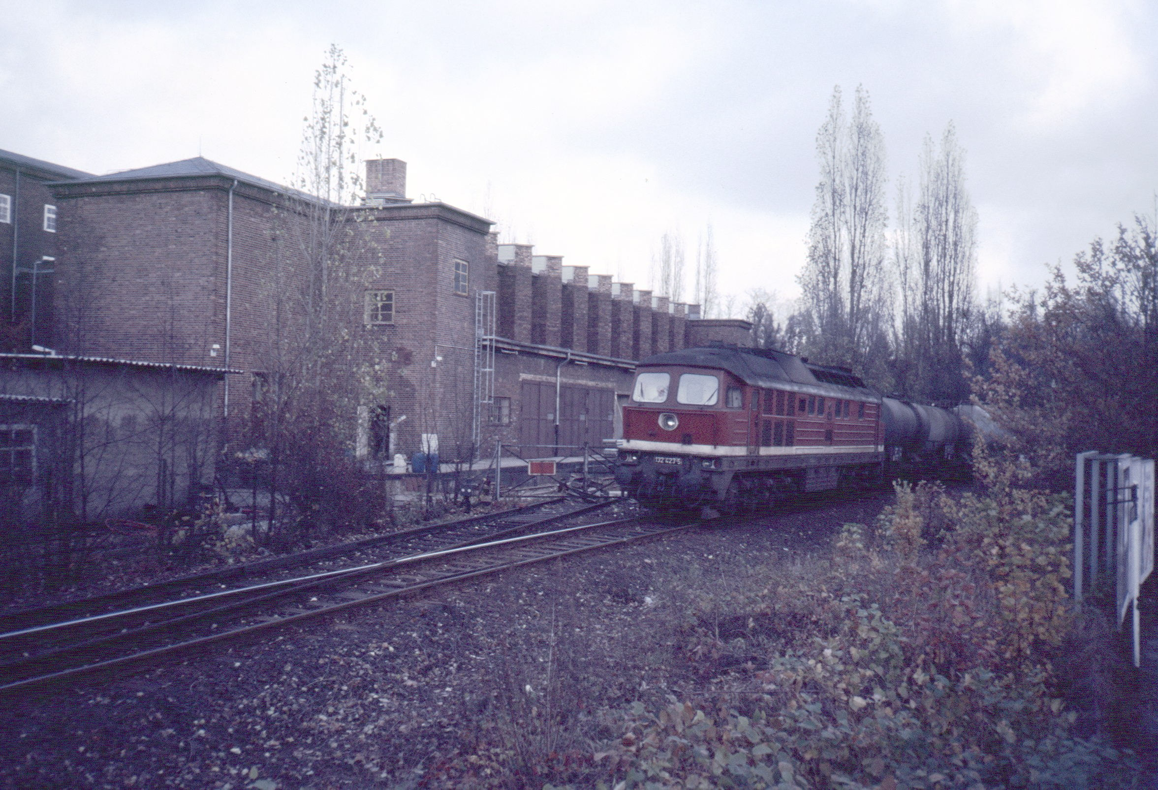 132 423 auf dem Verbindungsgleis an der Bornstedter Straße in Berlin